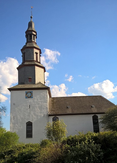 Evangelische Kirche Niederbiel, Solms, Lahn-Dill-Kreis, Hessen, Deutschland